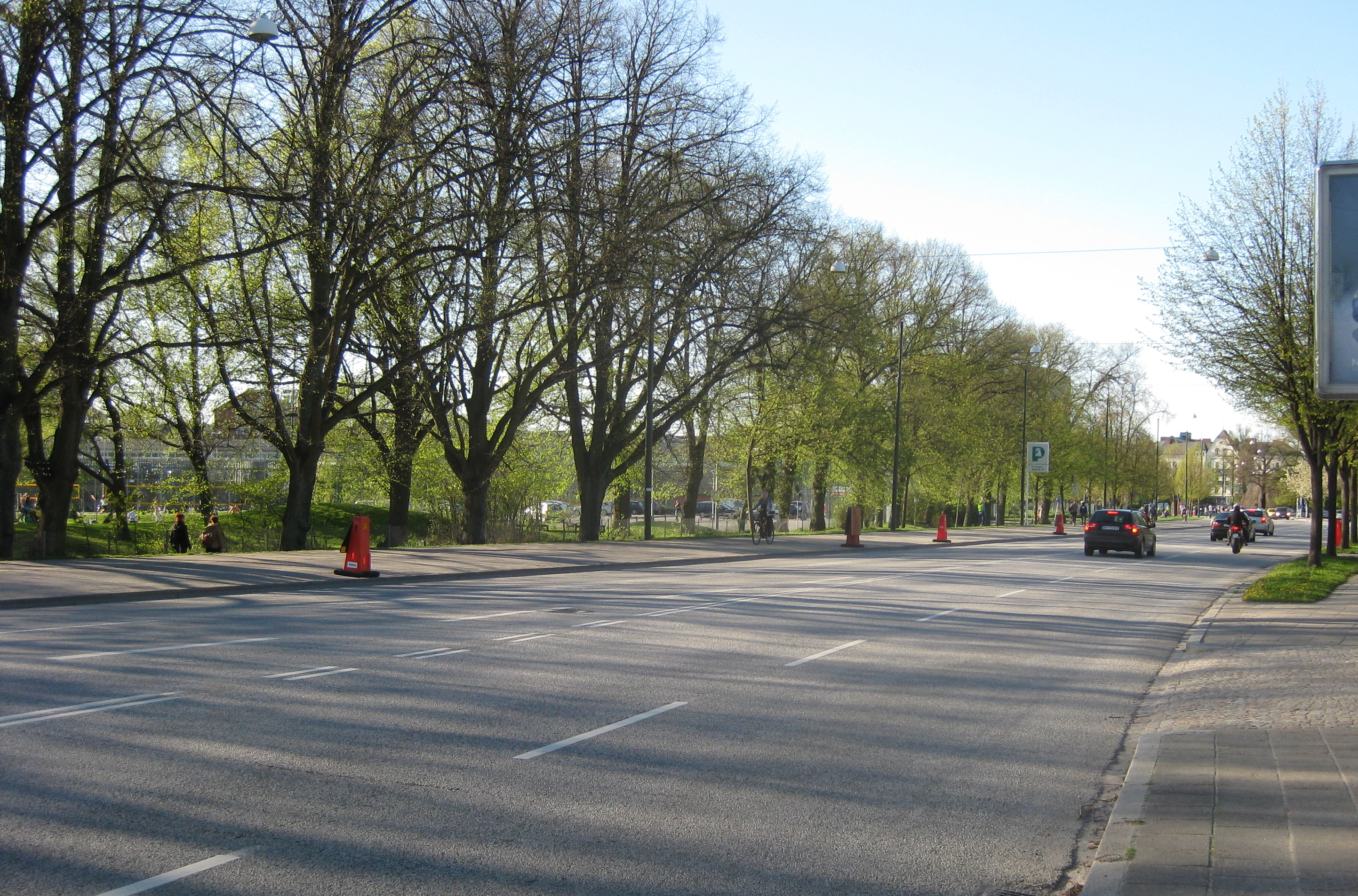 Pildammsvägen Mellan Pildammsparken och Gamla IP.